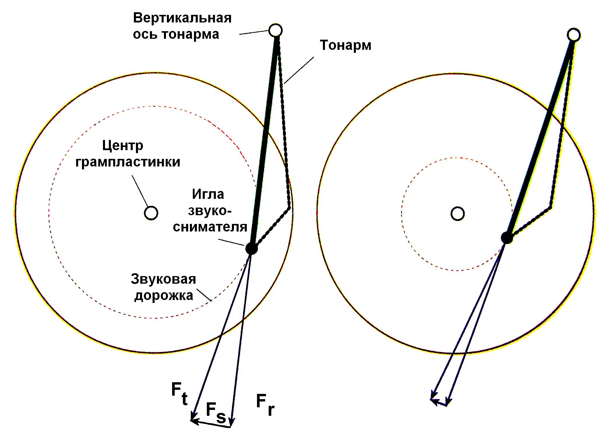 Перемещение звукоснимателя электрофона